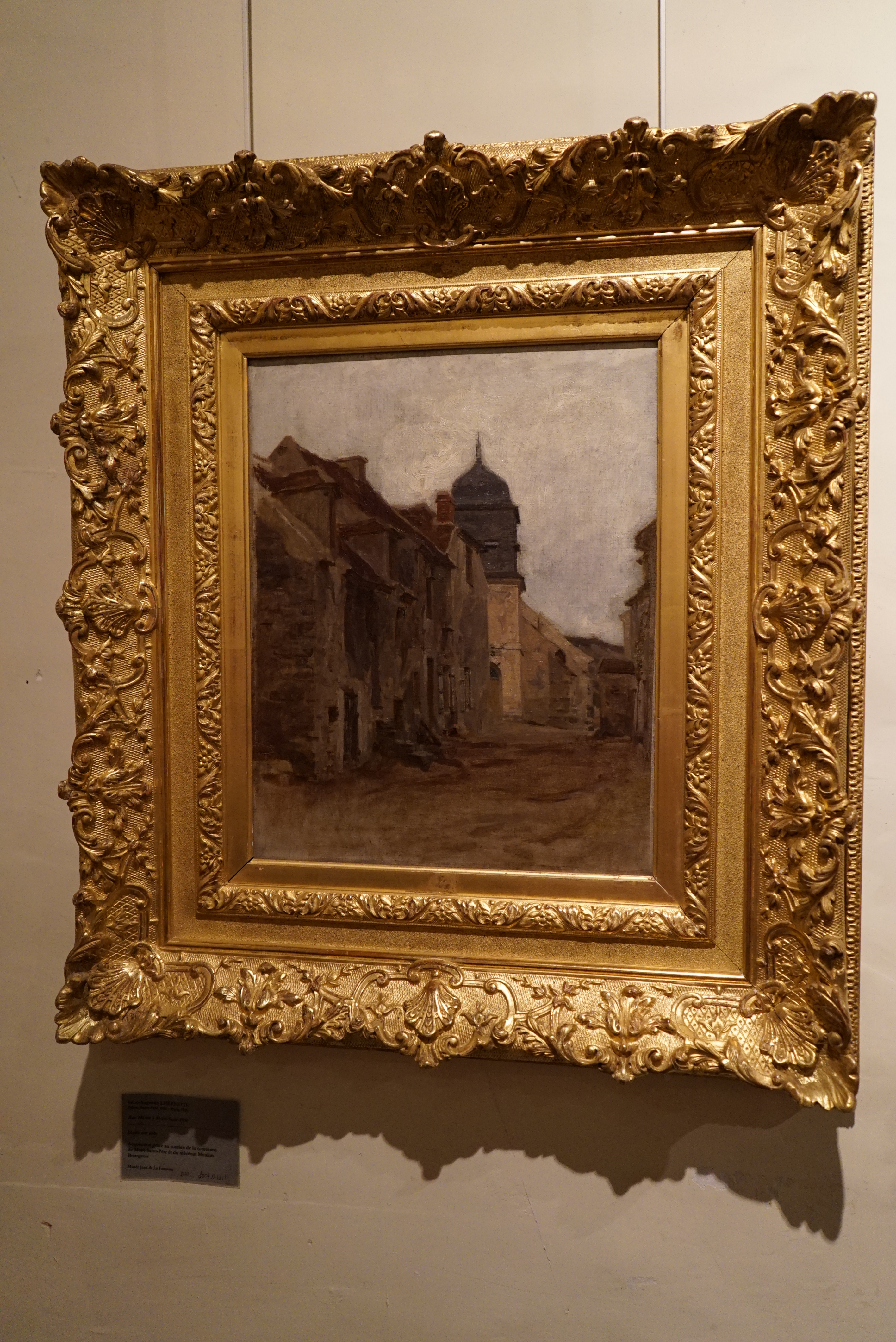 lors de la Nuit européenne des musées.